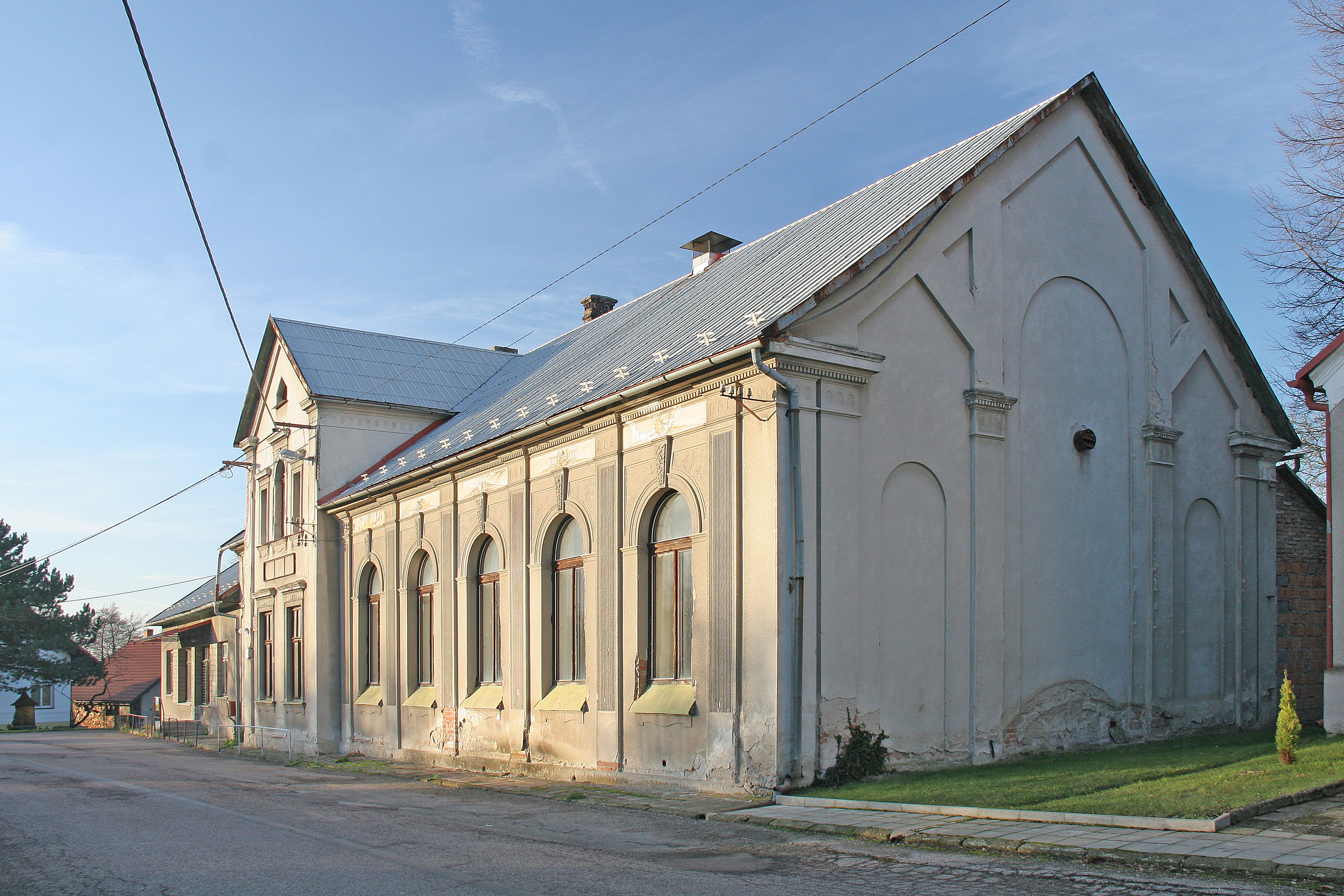 Záhornice čp. 65